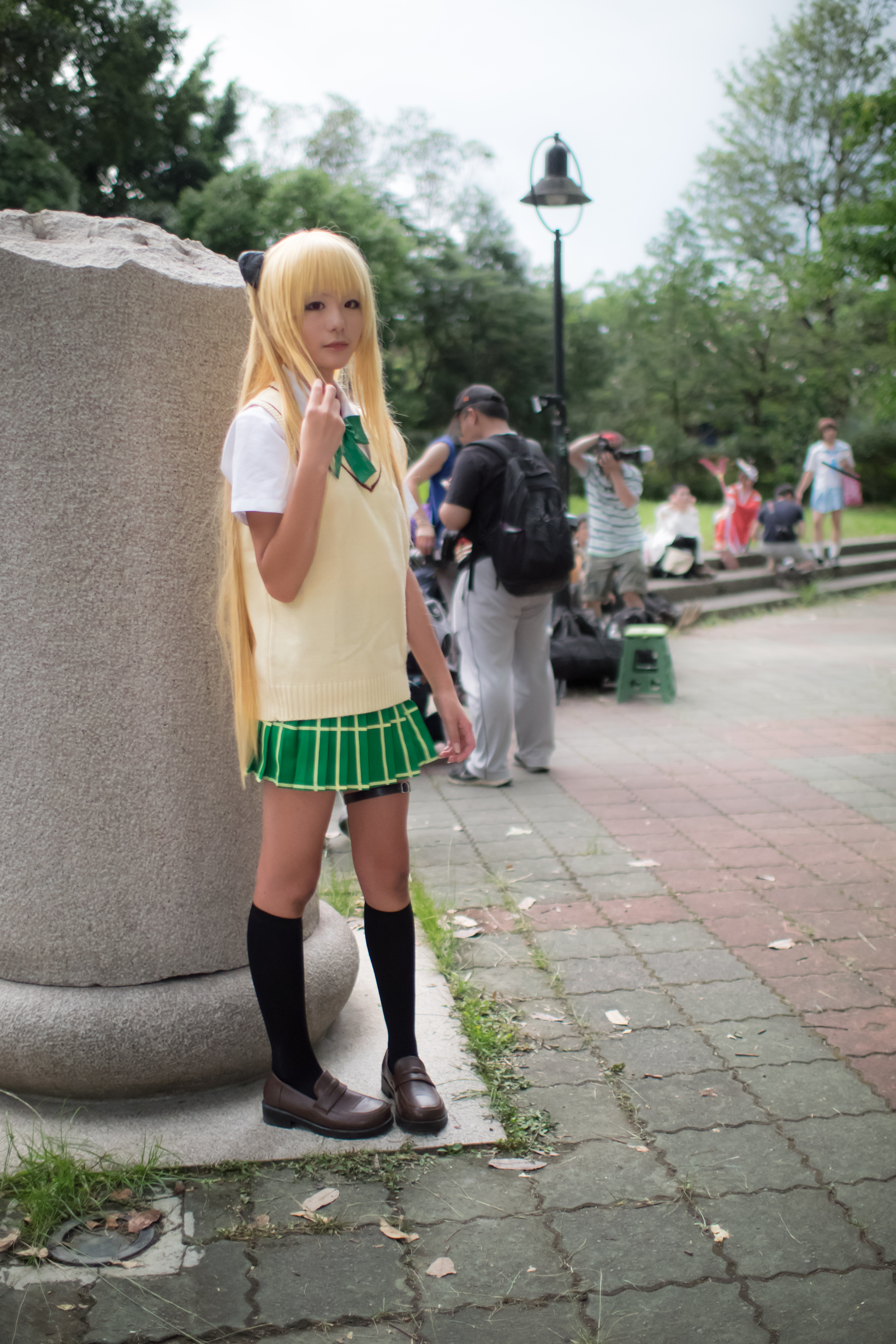 第24屆開拓動漫祭第一日下午，《出包王女Darkness》金色闇影（彩南高中學生服版）cosplayer。